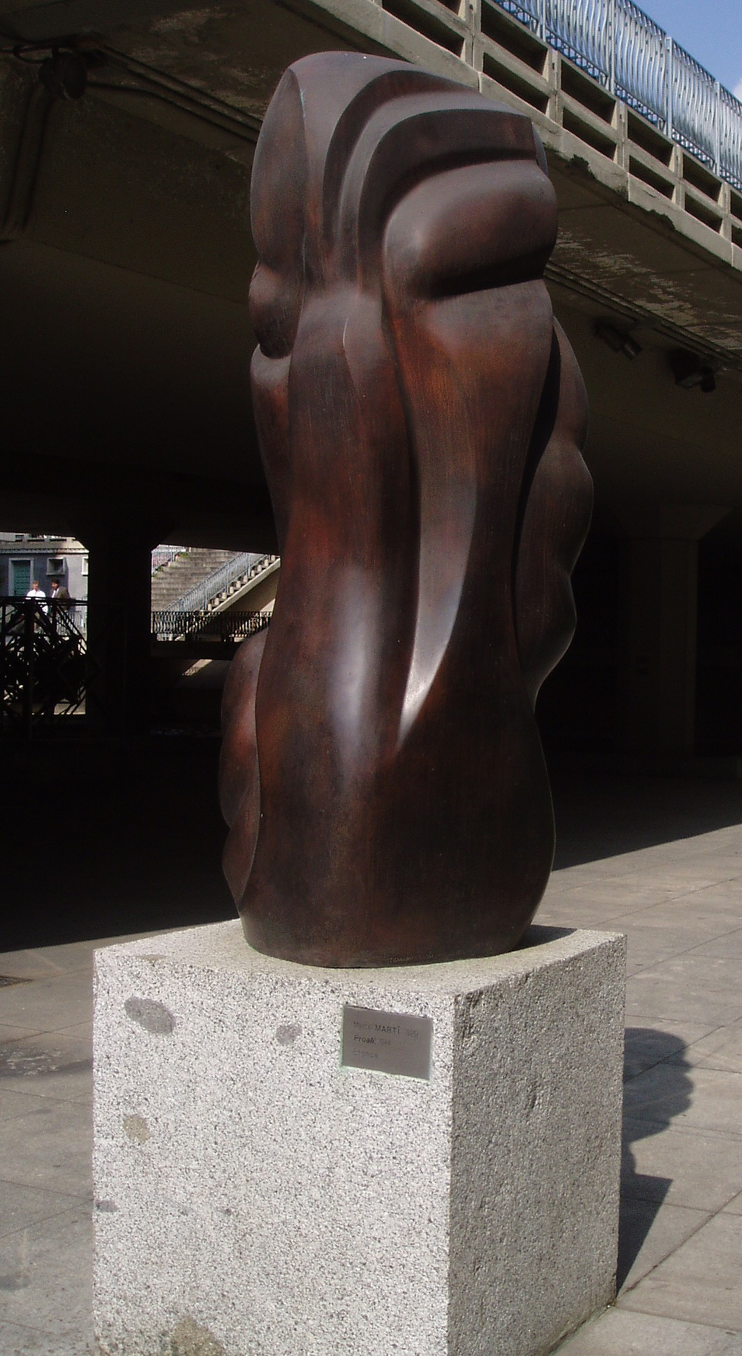 Proalí. Marcel Martí. Museo Arte Público. Madrid. España